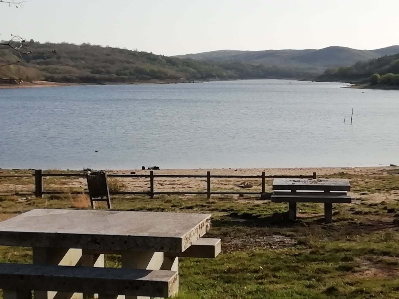 Meredendero de Pradomao